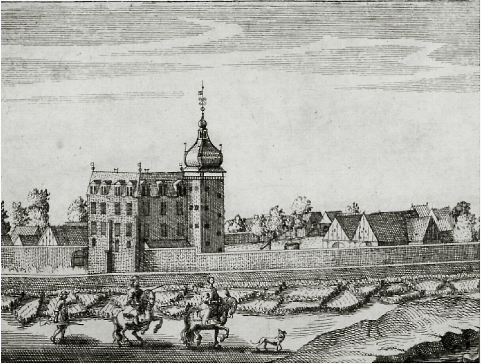 Burg Horn, Kupferstich von Elias van Lennep um 1663